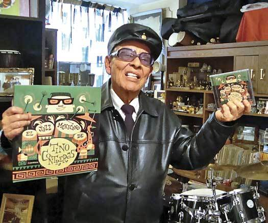 Reconocido como uno de los bateristas más importante de México, participó en la histórica grabación del primer Álbum Triple LPs de Jazz Mexicano, para el sello Orfeón, Jazz en México, en 1954, lo que significó un auténtico despegue para su carrera, pues su trabajo llamó mucho la atención y los contratos no se hicieron esperar. En esta producción incluyó algunos de sus primeros temas de jazz, la cual fue reeditada en 2004 en Europa.